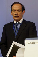 Ministro Rodrigo Peñailillo informando a la ciudadanía que se ha decretado Estado de Excepción Constitucional de Catástrofe para la Región de Atacama, Chile, por el temporal